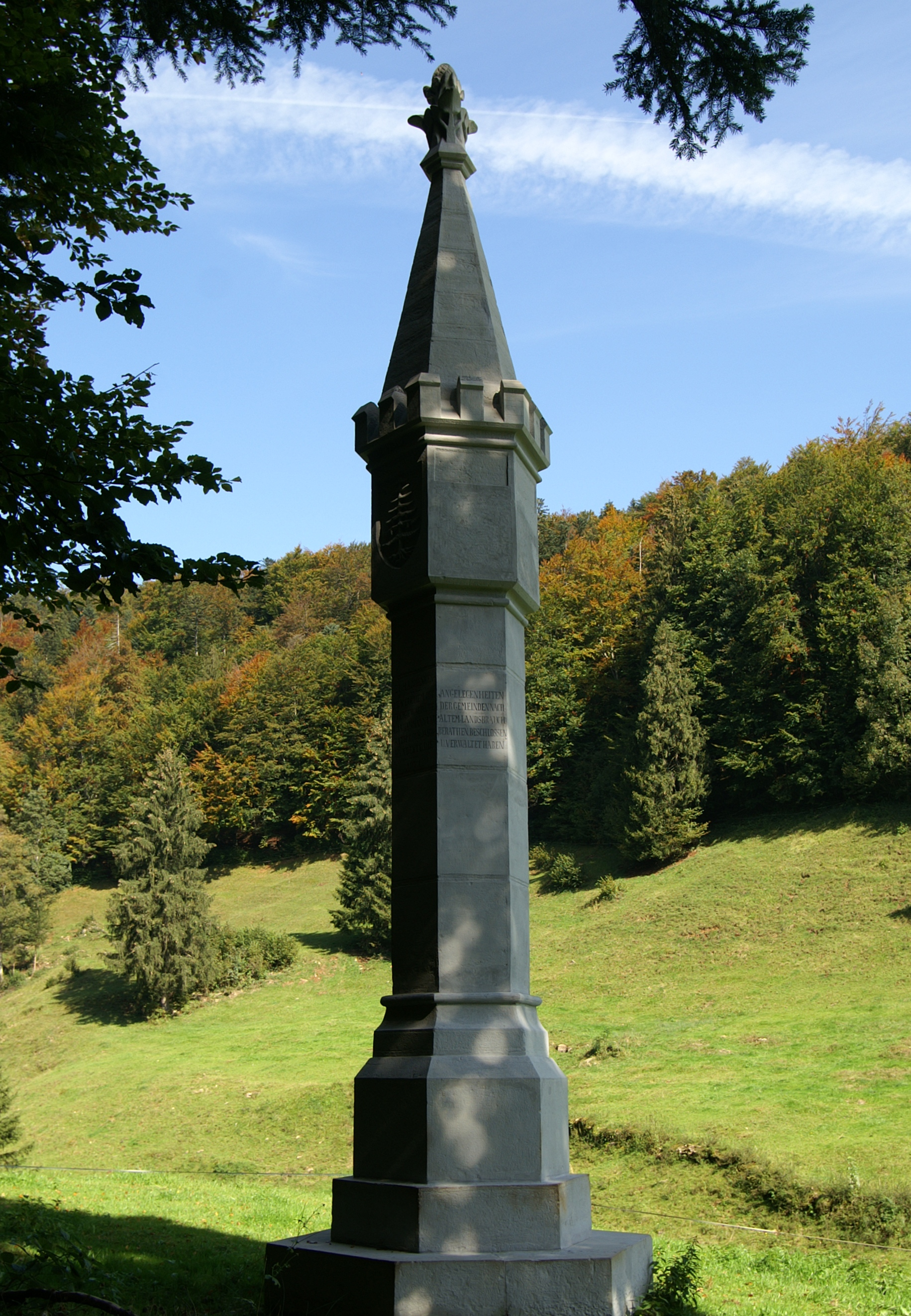 “Inschrift” zum Andenken: An dieser Stelle stand das hoelzerne im J.1807 abgebrochene Rathhaus des Inner-Bregenzerwaldes in welchem der freigewaehlte Landammann und Rath durch Jahrhunderte die Angelegenheiten der Gemeinden nach altem Landsbrauch berathen, beschlossen u. verwaltet haben. /// aus dem DEHIO Vorarlberg 1983: GEDENKSÄULE, am Bezegg. Errichtet 1871 vom Wiener Dombaumeister und Ringstrassenarchitekten Friedrich von Schmidt als Erinnerungsmal an das 1807 abgebrochene Rathaus des Inneren Bregenzerwaldes, in Bezau.